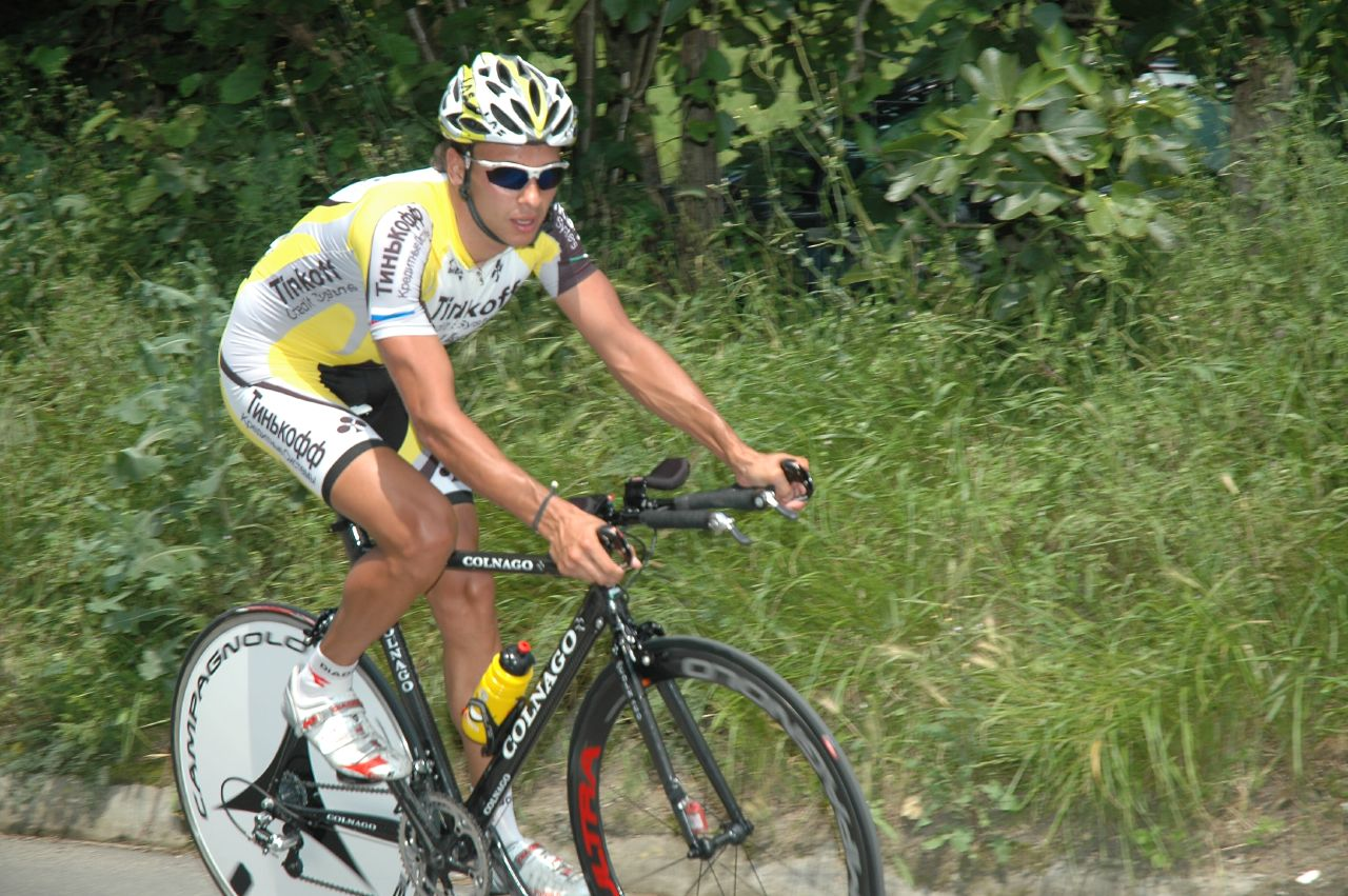 Sergej Klimov, Euskal Bizikleta 2007